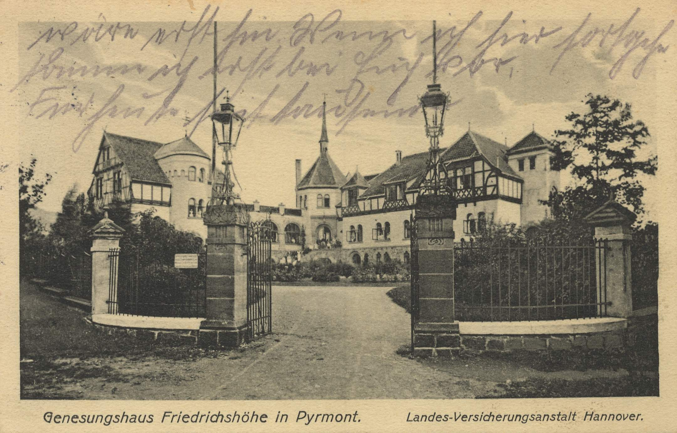 Genesungshaus Friedrichshöhe